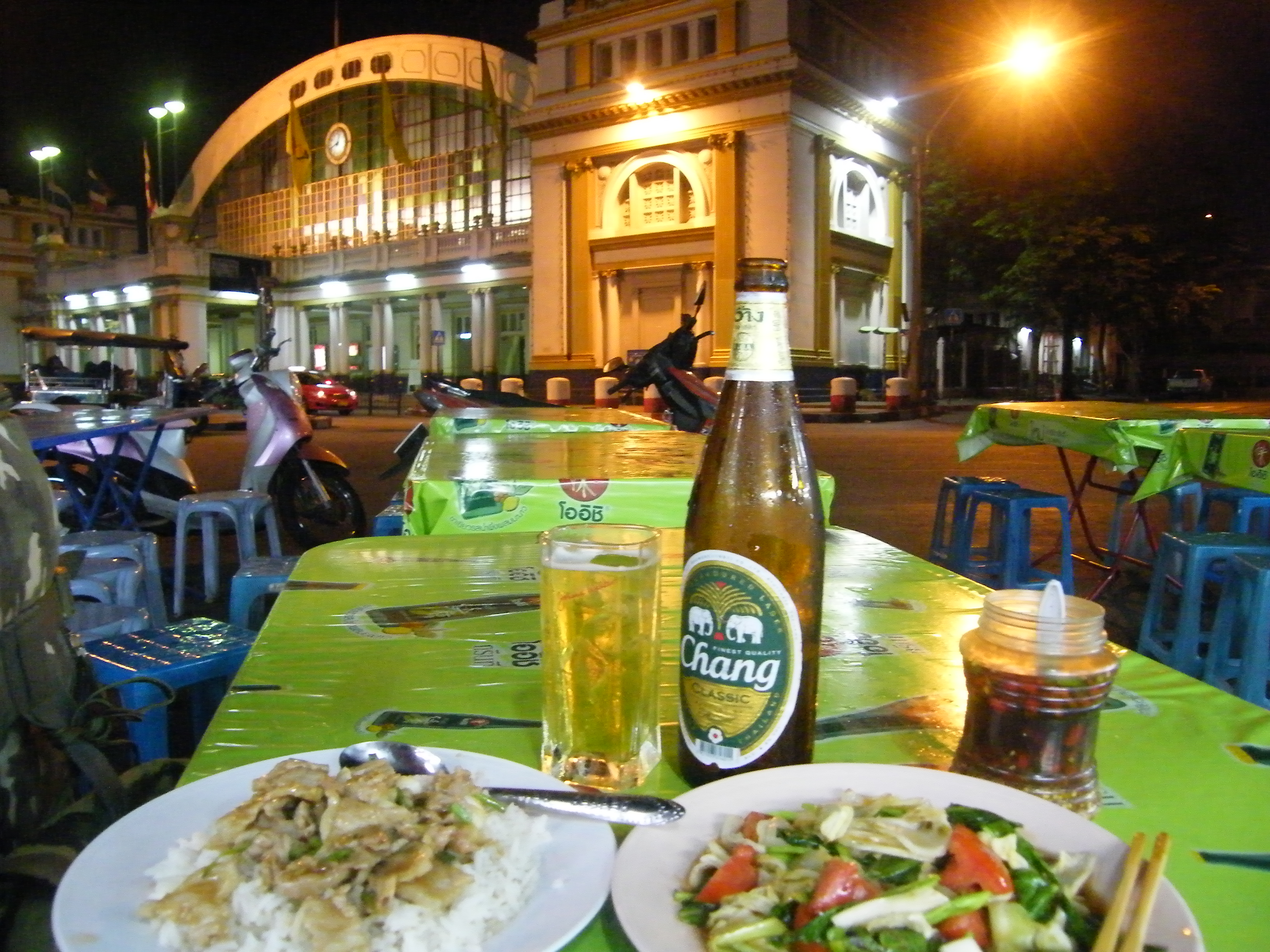 Rong Muang, Pathum Wan, Bangkok 10330, Thailand